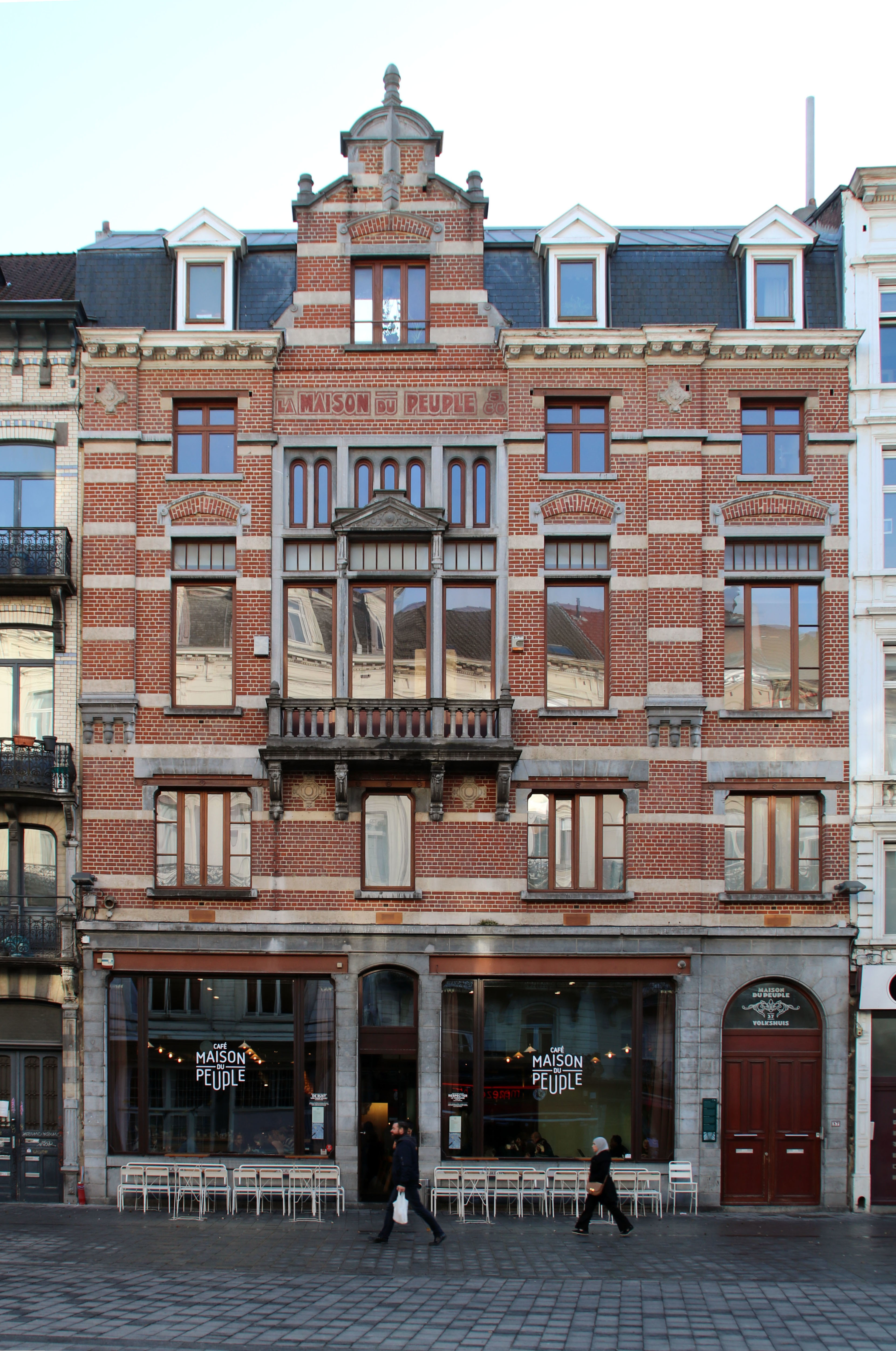 Siège d'une société coopérative devenu un bar